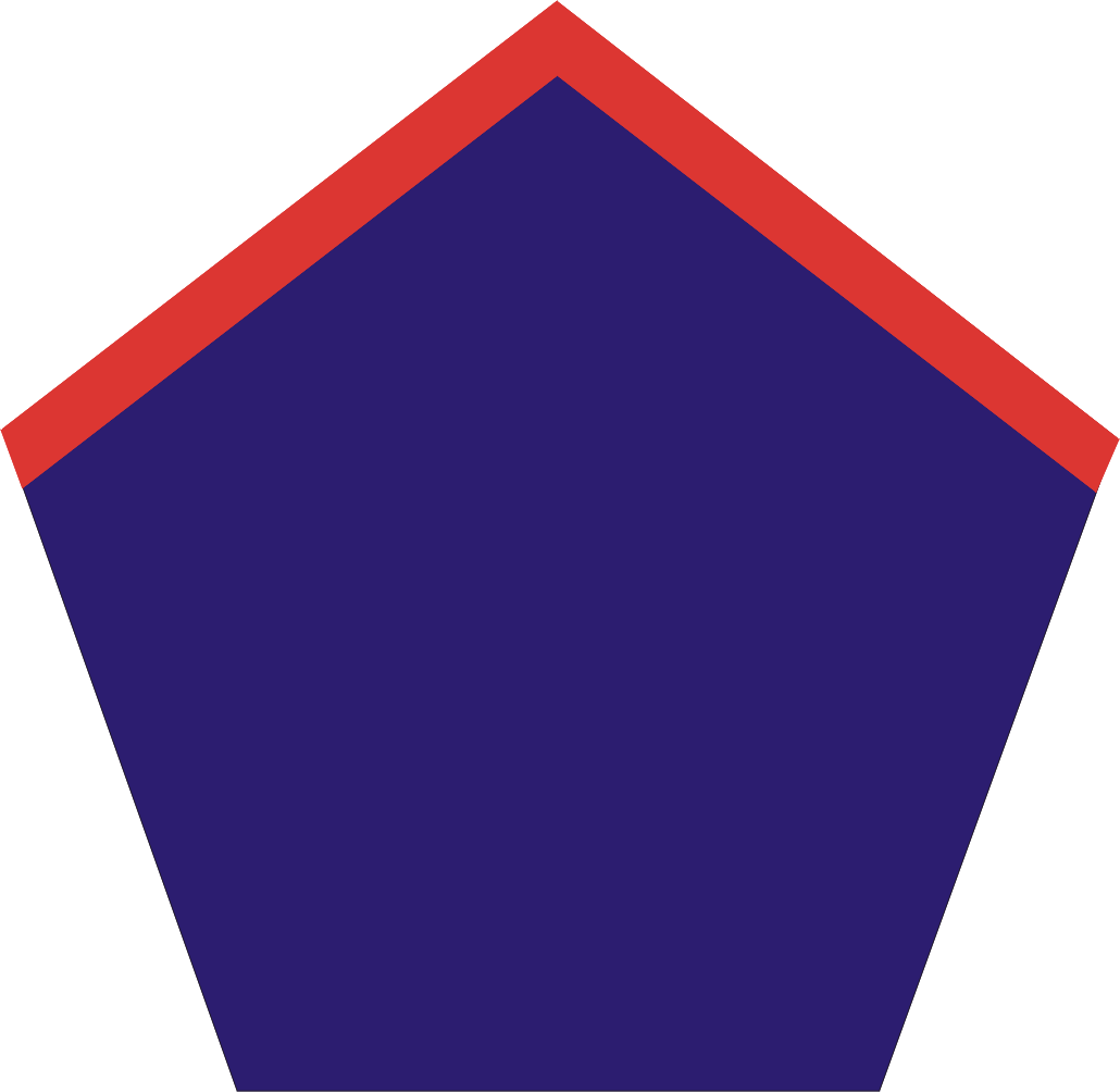 Patka generała (na kołnierz) wprowadzona w Wojsku Polskim w Anglii w 1941